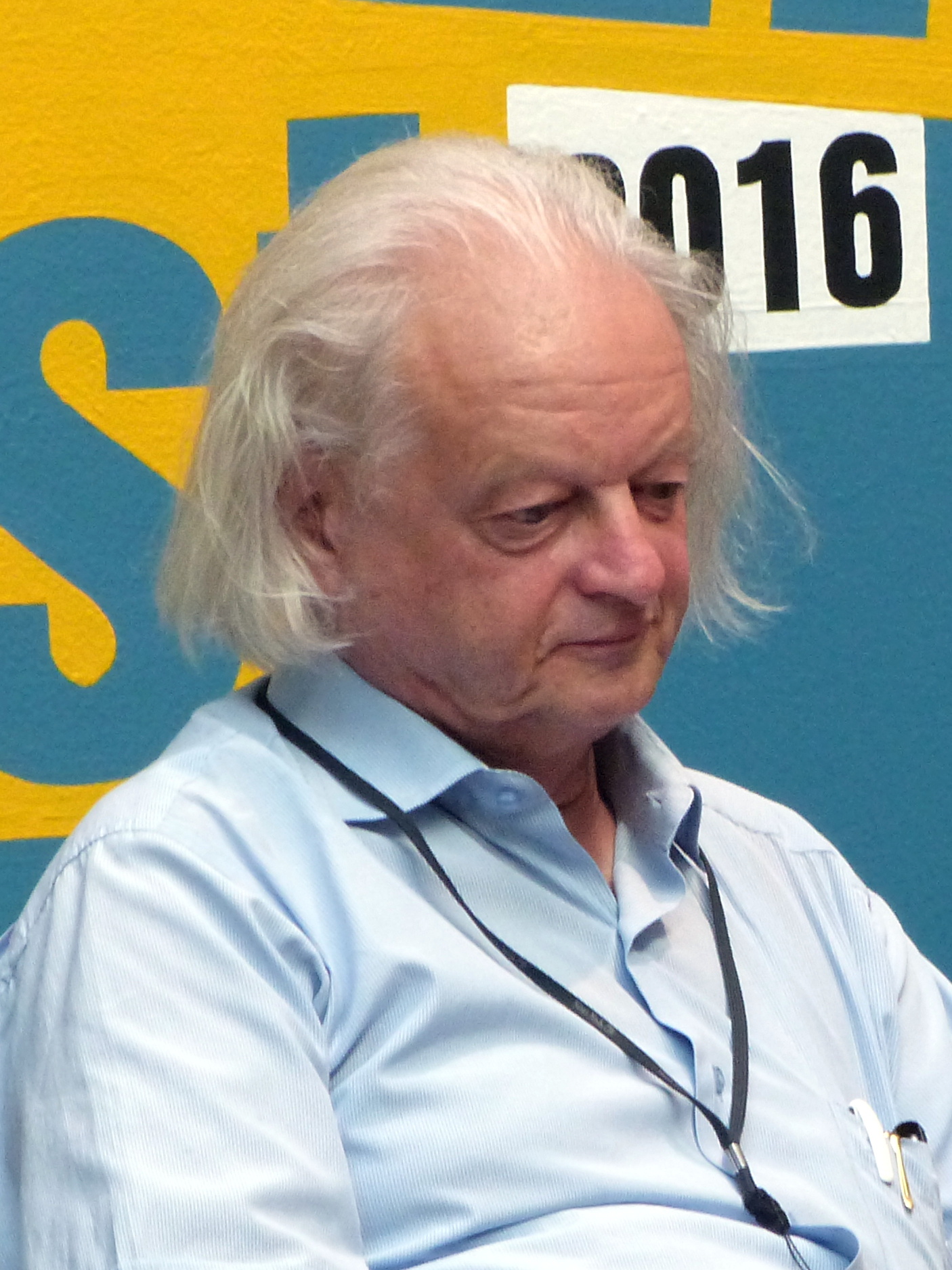 Der Historiker und Rückert-Experte Rudolf Kreutner bei einer Podiumsdiskussion auf dem Erlanger Poetenfest 2016.